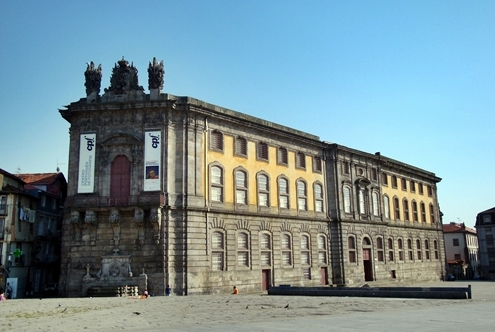 Centro Português de Fotografia, museu. Antigo tribunal e prisão da Relação do Porto. Localizado frente ao jardim de João Chagas, ou jardim da Cordoaria, no campo dos Mártires da Patria, freguesia da Vitória, Porto, Portugal.